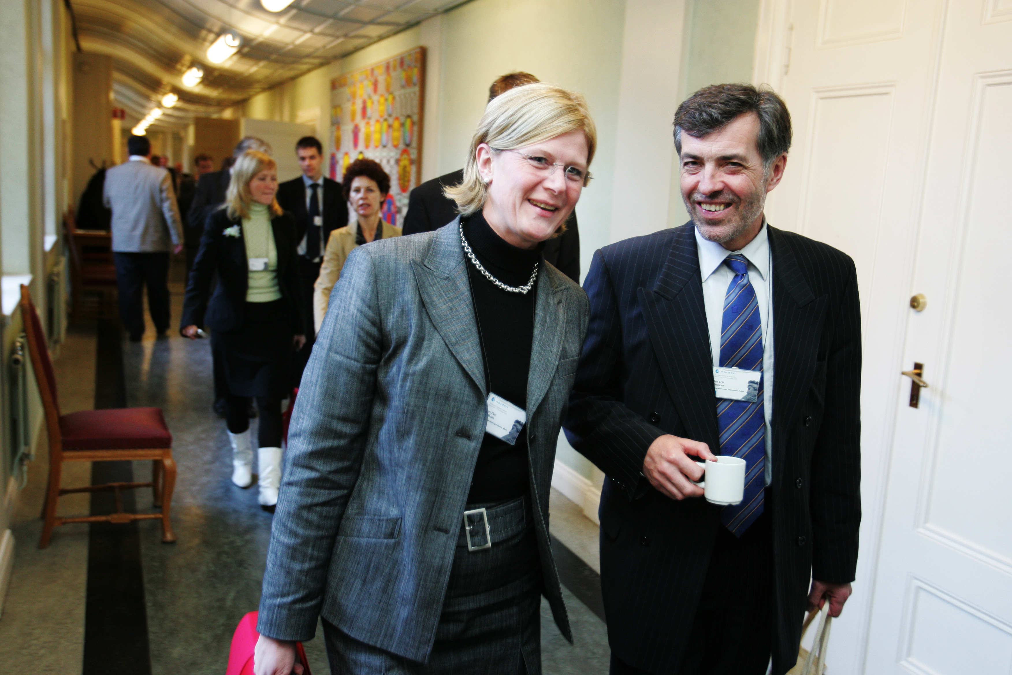 Jan-Erik Enestam, Finlands miljö- och samarbetsminister, på väg in till möte.